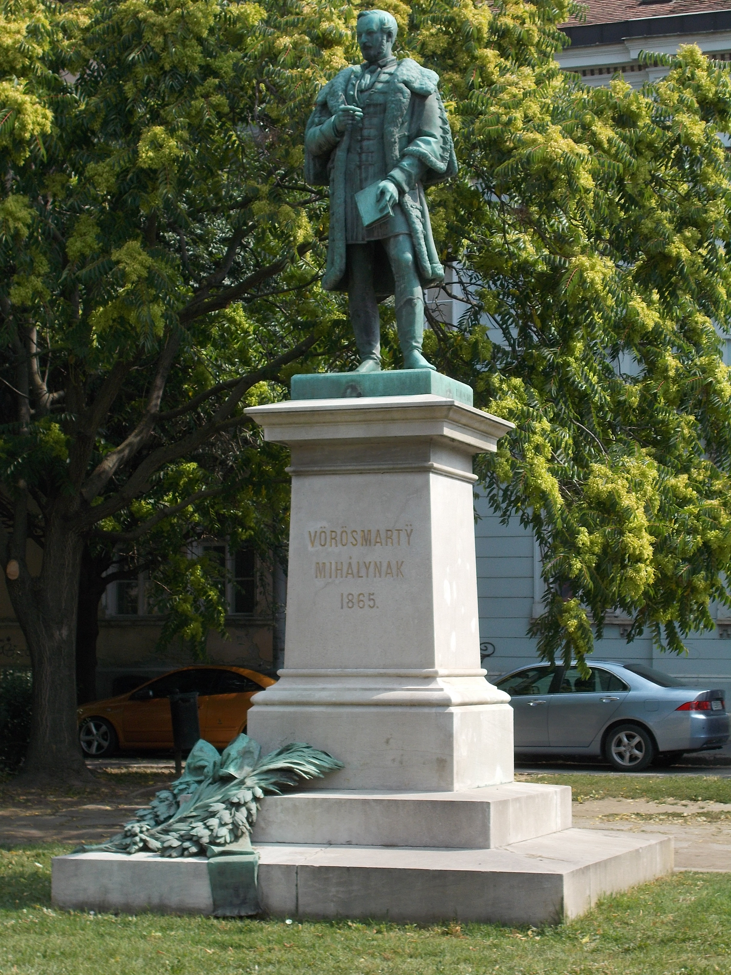 Vörösmarty Mihály szobra műemlék ID 3919 (1865. Vay Miklós alkotása) Háromlépcsős fehér márvány talapzaton emelkedő, zömök toszkán pilléren áll a költő egészalakos bronzszobra. - Magyarország, Fejér megye, Székesfehérvár, Vörösmarty Mihály tér 8. This is a photo of a monument in Hungary, Identifier: 3919